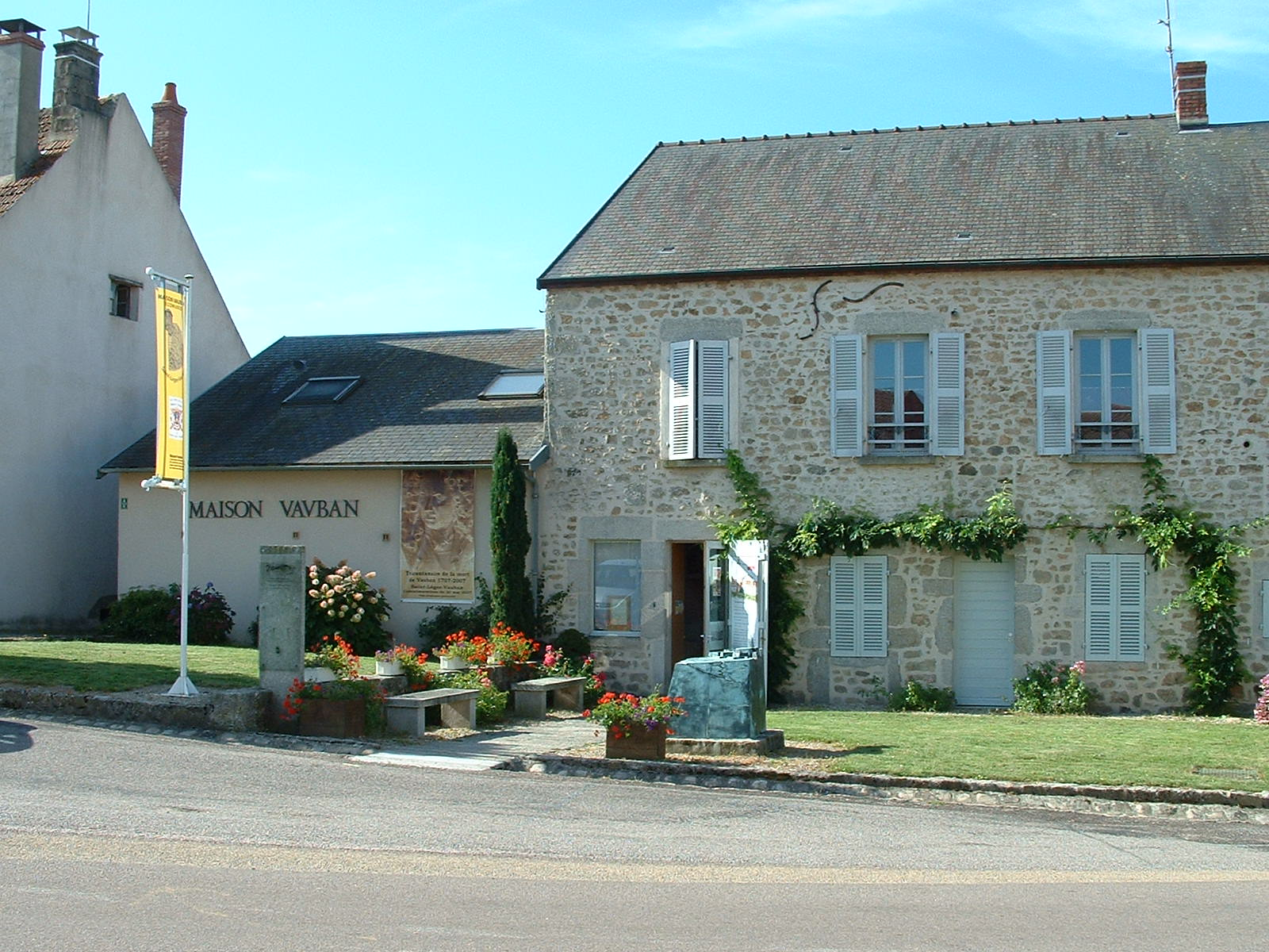 Saint-Léger-Vauban, Yonne : la Maison Vauban faisant partie de l'écomusée du Morvan